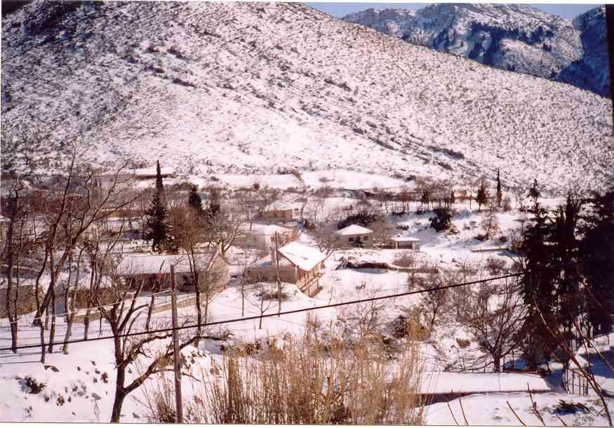 Χιονισμένο Λεχούρι